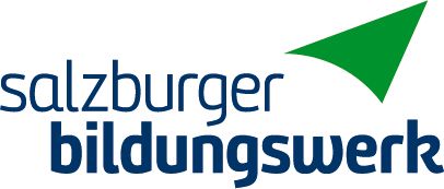 Juni 2019